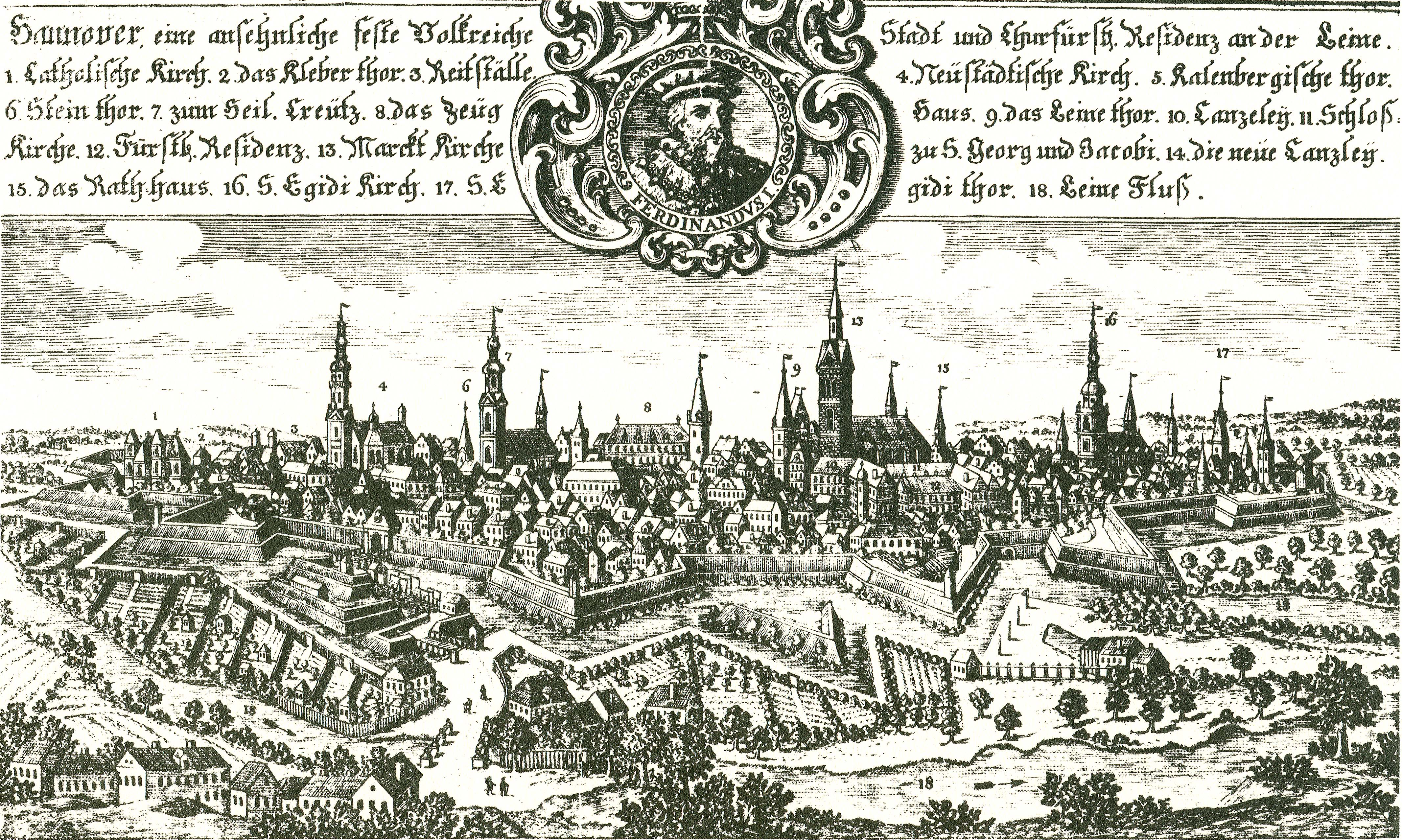 Kupferstich mit einer Ansicht der Stadt Hannover um 1735, von Westen aus gesehen, mit dem inneren und dem äußeren Leintor. Den ursprünglichen Stich, zugleich die detaillierteste und künstlerisch vollkommenste Aufnahme dieser Stadtansicht im 18. Jahrhundert, schuf der Kupferstecher Friedrich Bernhard Werner, dessen Ansicht dann mehreren anderen Stechern als Vorlage für ihre eigenen Hannover-Darstellungen dienten, obwohl sie die wiedergegebene Stadt zumeist nie mit eigenen Augen gesehen hatten. Darunter fand sich beispielsweise auch der Augsburger Kupferstecher Johann Friedrich Probst, dessen eigene Nachbildung der Aufnahme Werners hier wiederum von einem weiteren Kupferstecher "kopiert" wurde, wobei das im Verhältnis viel breitere Ursprungsbild hier durch eine Überhöhung beispielsweise der Kirchtürme kompensiert wird. Literatur: Franz Rudolf Zankl: Ansicht Hannovers von Westen. Kupferstich nach F. B. Werner. Um 1785, in ders: (Hrsg.): Hannover Archiv, Blatt S 15 ...